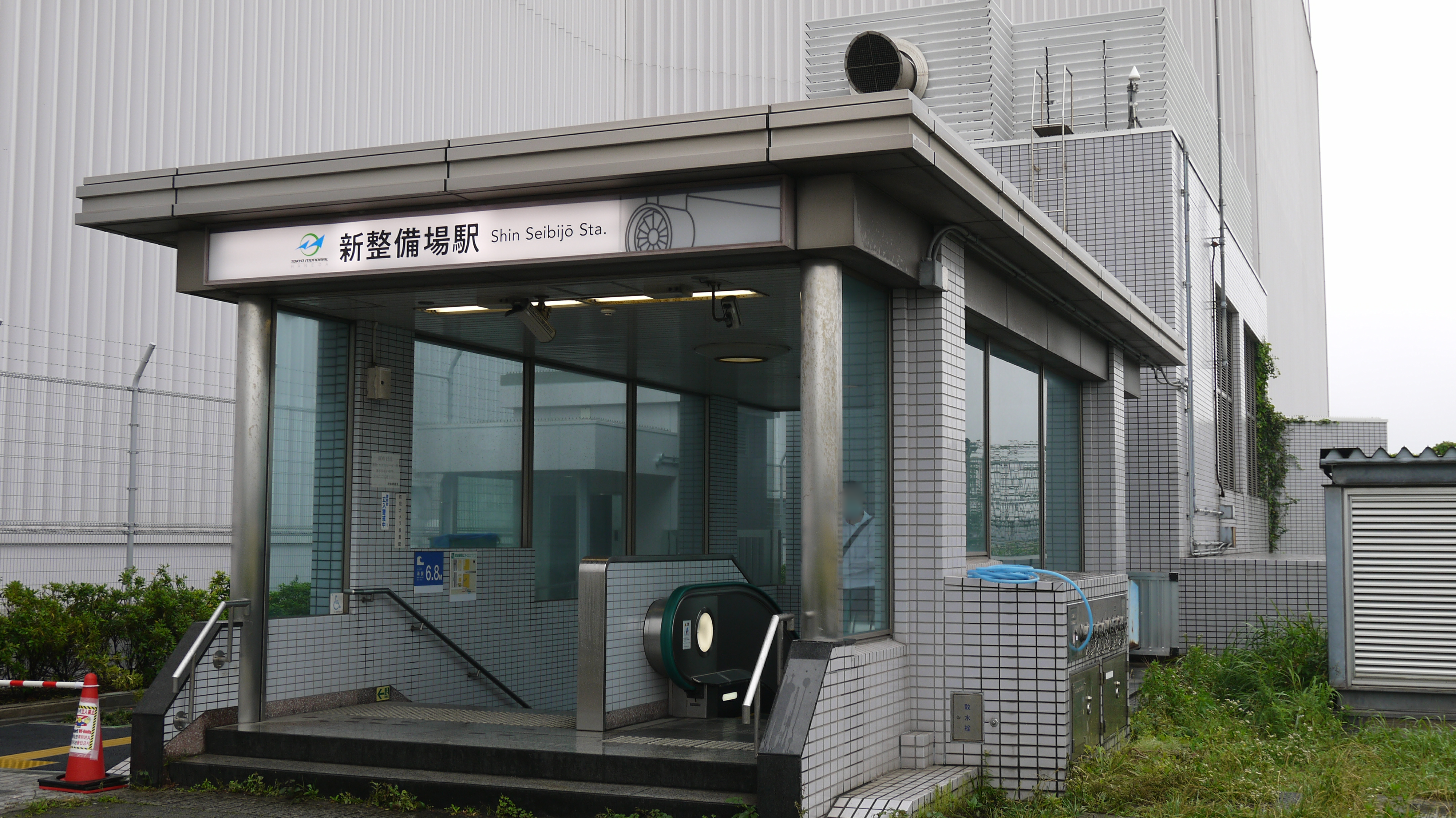 新整備場駅